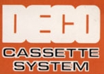 Logo des DECO Cassette System (Arcadesystem der Data East Corp. DECO)